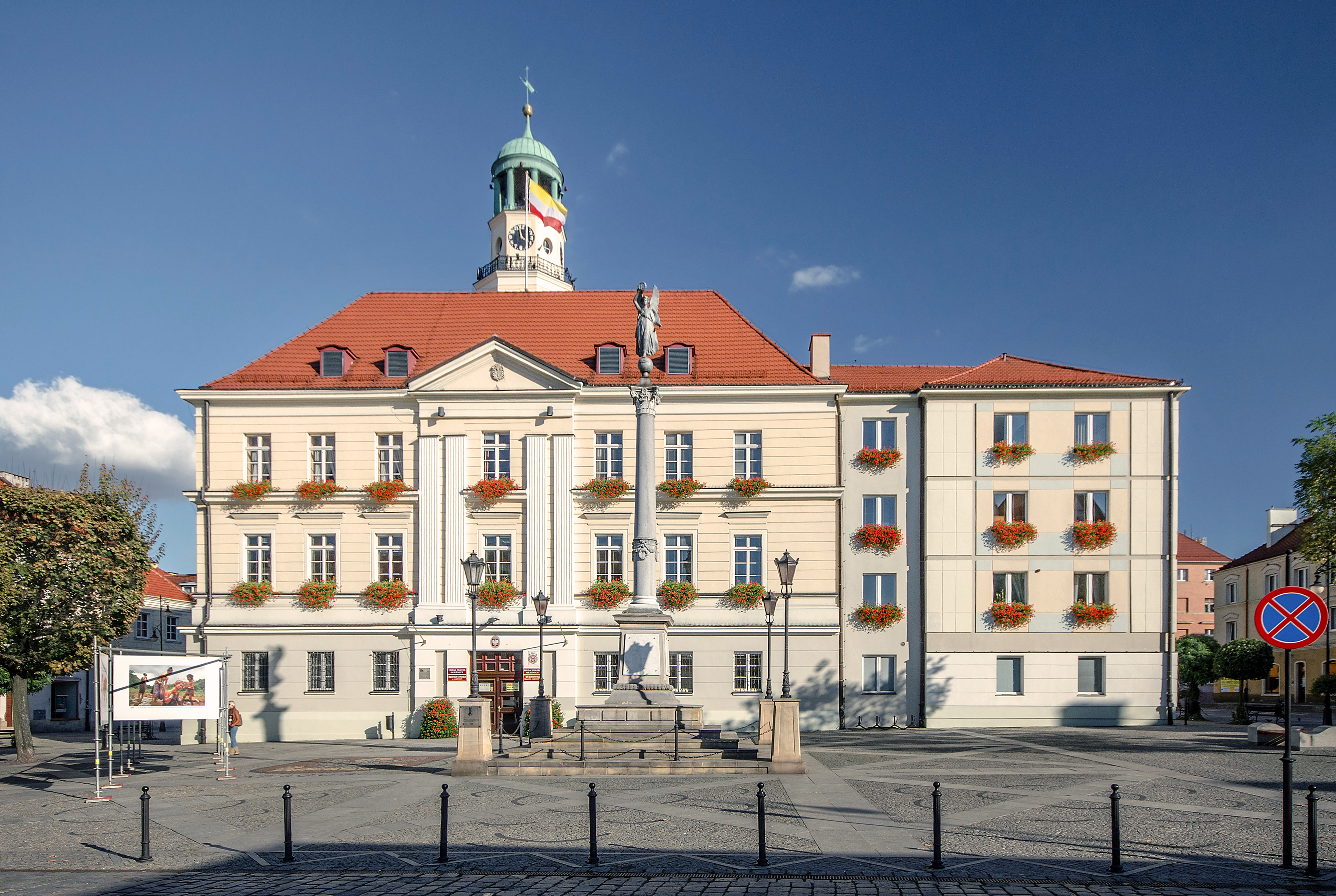 Oleśnica, ratusz, pocz. XV, 1536, 1750